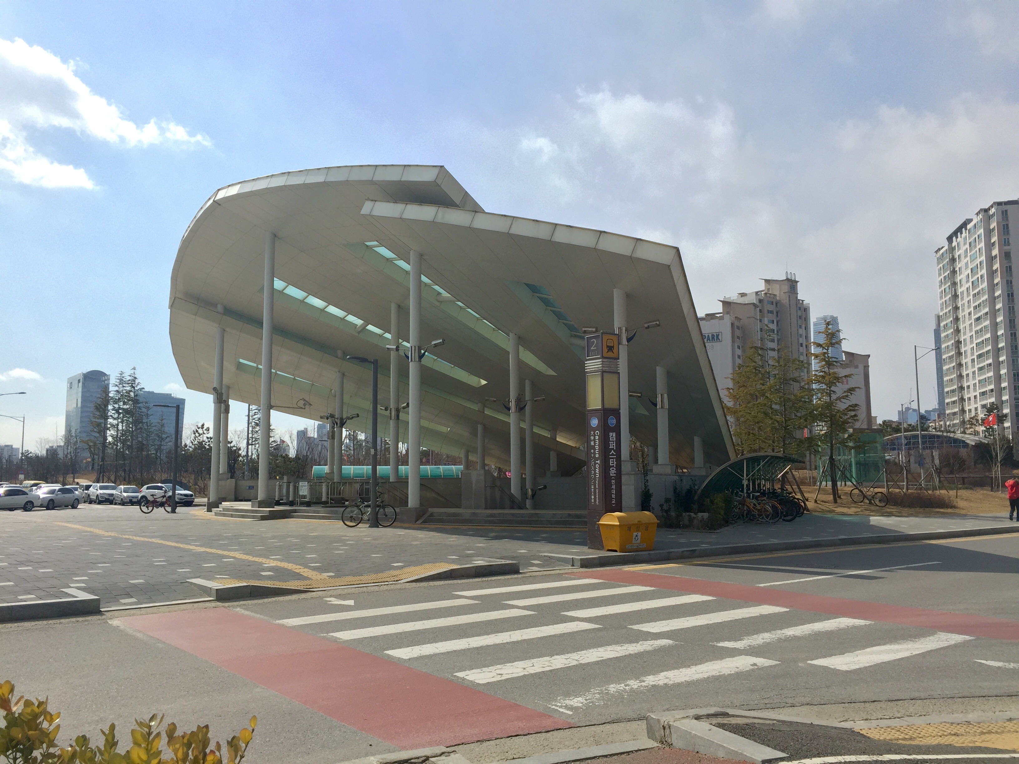 인천1호선 캠퍼스타운역 2번 출입구